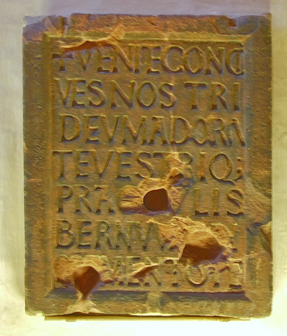 Inschriftenstein in St. Michael, Hildesheim; Text wohl von Bischof Bernward (993-1022) selbst verfasst ([1]): + VENITE CONCIVES NOSTRI DEVM ADORATE VESTRIQVE PRAESVLIS BERNVVARDI MEMENTOTE "Kommt, unsere Mitbürger, betet Gott an und gedenkt eures Bischofs Bernward."